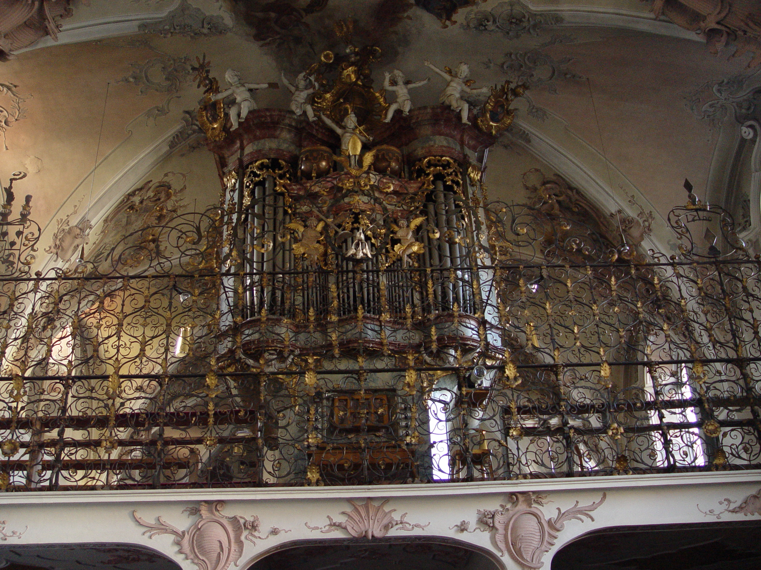 Bild selbst gemacht - own work Aichgasser-Orgel im Kloster Wald in der Gemeinde Wald (Hohenzollern), Deutschland Photographed by: Zollernalb